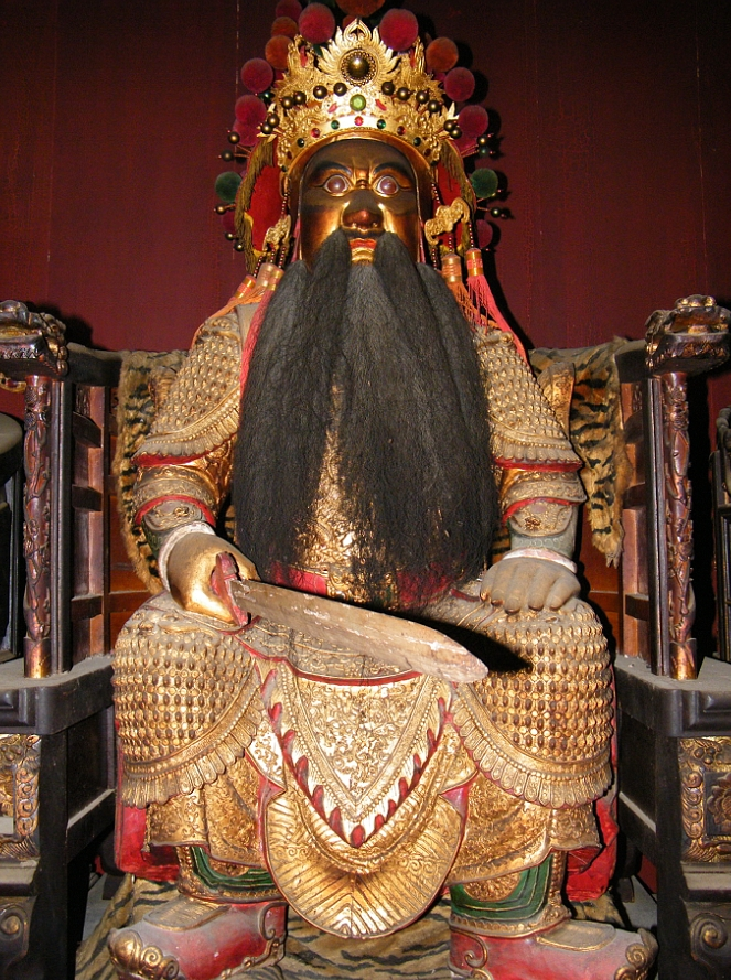 汕头市濠江区达濠青篮田心宫三山国王正像